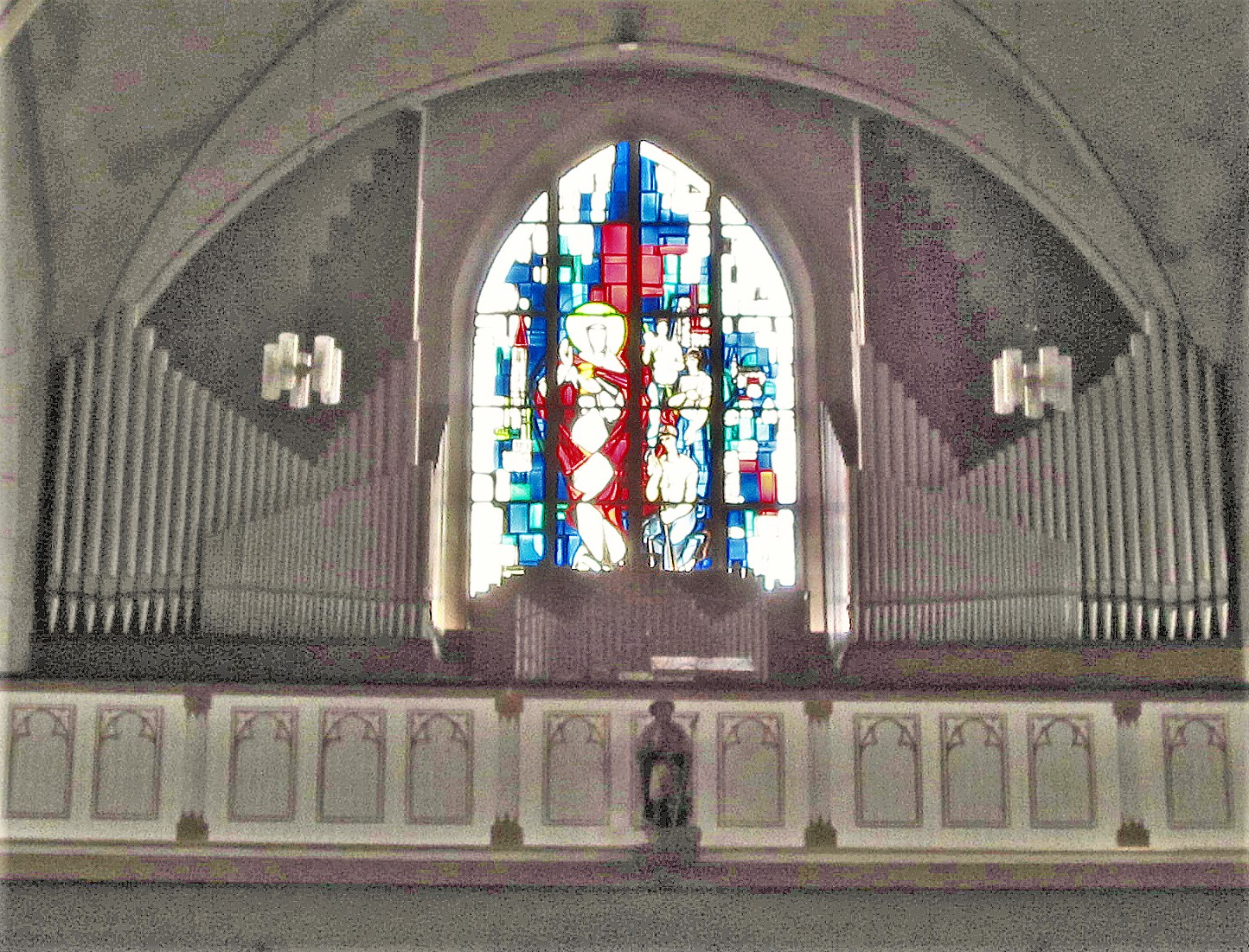 Orgelprospekt der katholischen Pfarrkirche St. Bartholomäus in Schwarzenholz, einem Ortsteil der Gemeinde Saarwellingen, Landkreis Saarlouis, Saarland